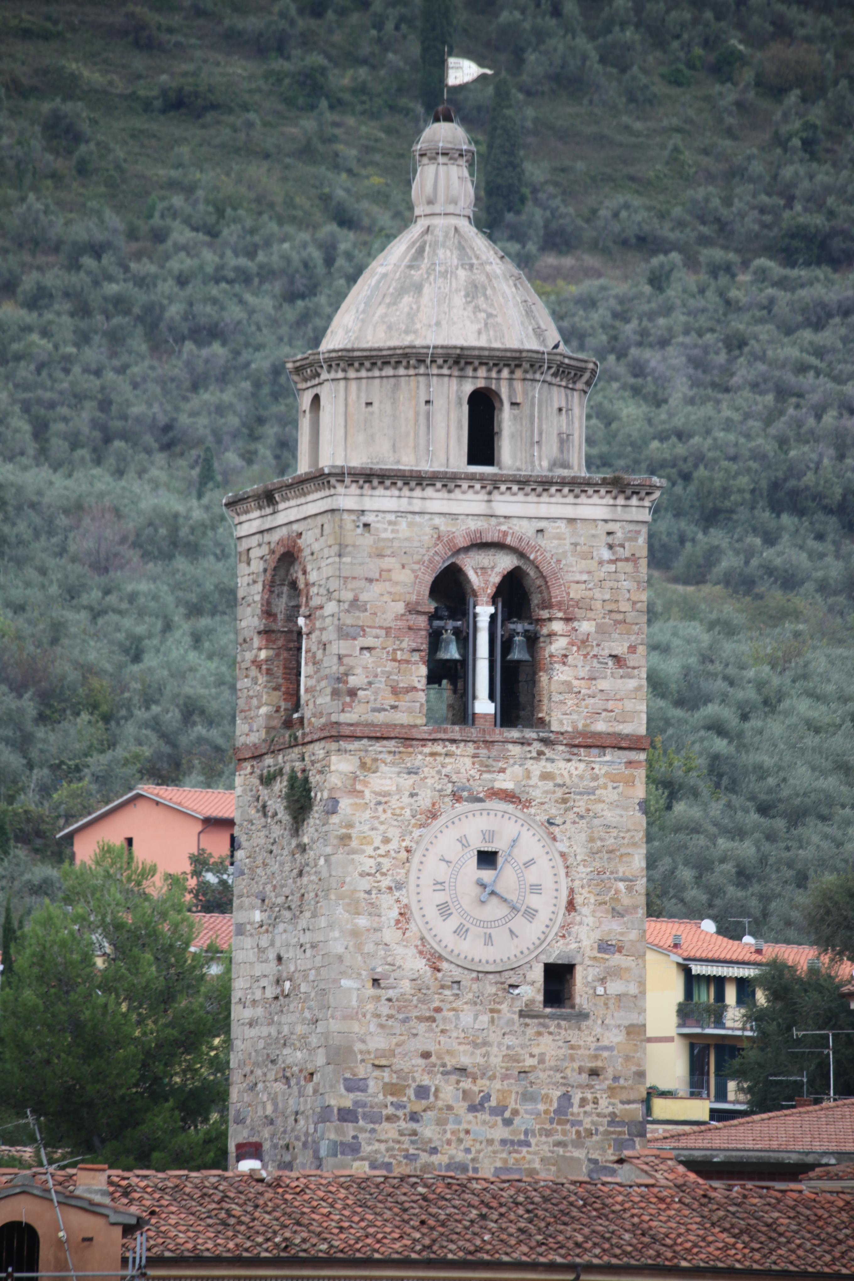 Campanile della Pieve di San Giovanni Battista, Buti